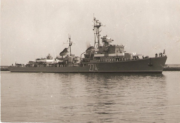 Niszczyciel O.R.P. Wicher ,okręt na którym służyłem w latach 1971r./1973r.